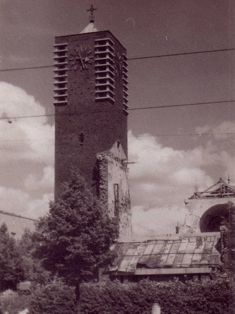 St. Sebstian München um 1944